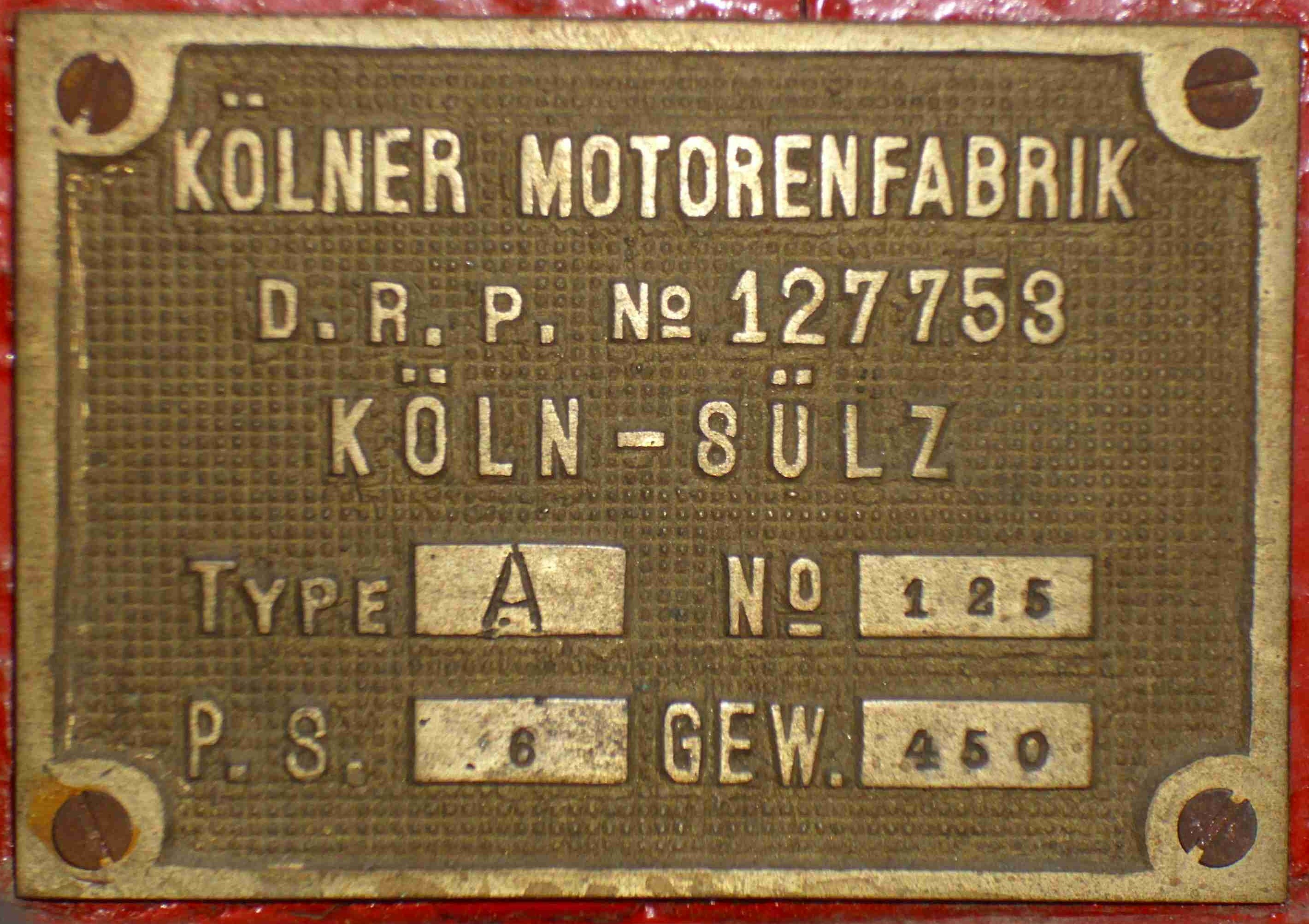 Emblem Kölner Motorenfabrik